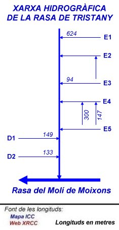 Mapa esquemàtic de la xarxa hidrogràfica de la Rasa de Tristany, al Solsonès